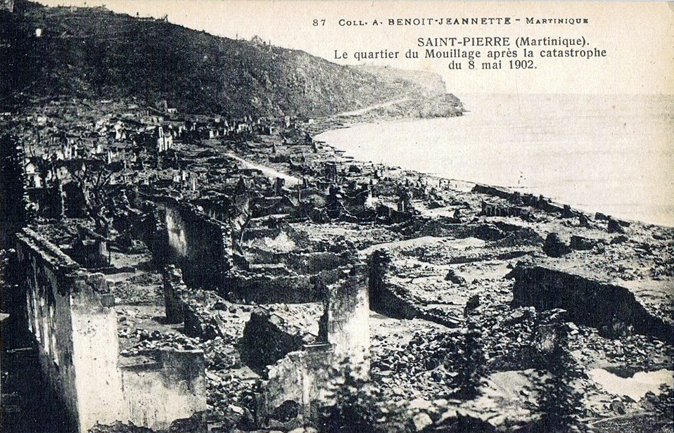 Le quartier du Mouillage à Saint-Pierre (Martinique) après la catastrophe du 8 mai 1902.